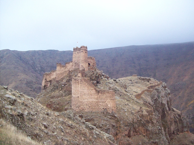 ქაჯის ციხე